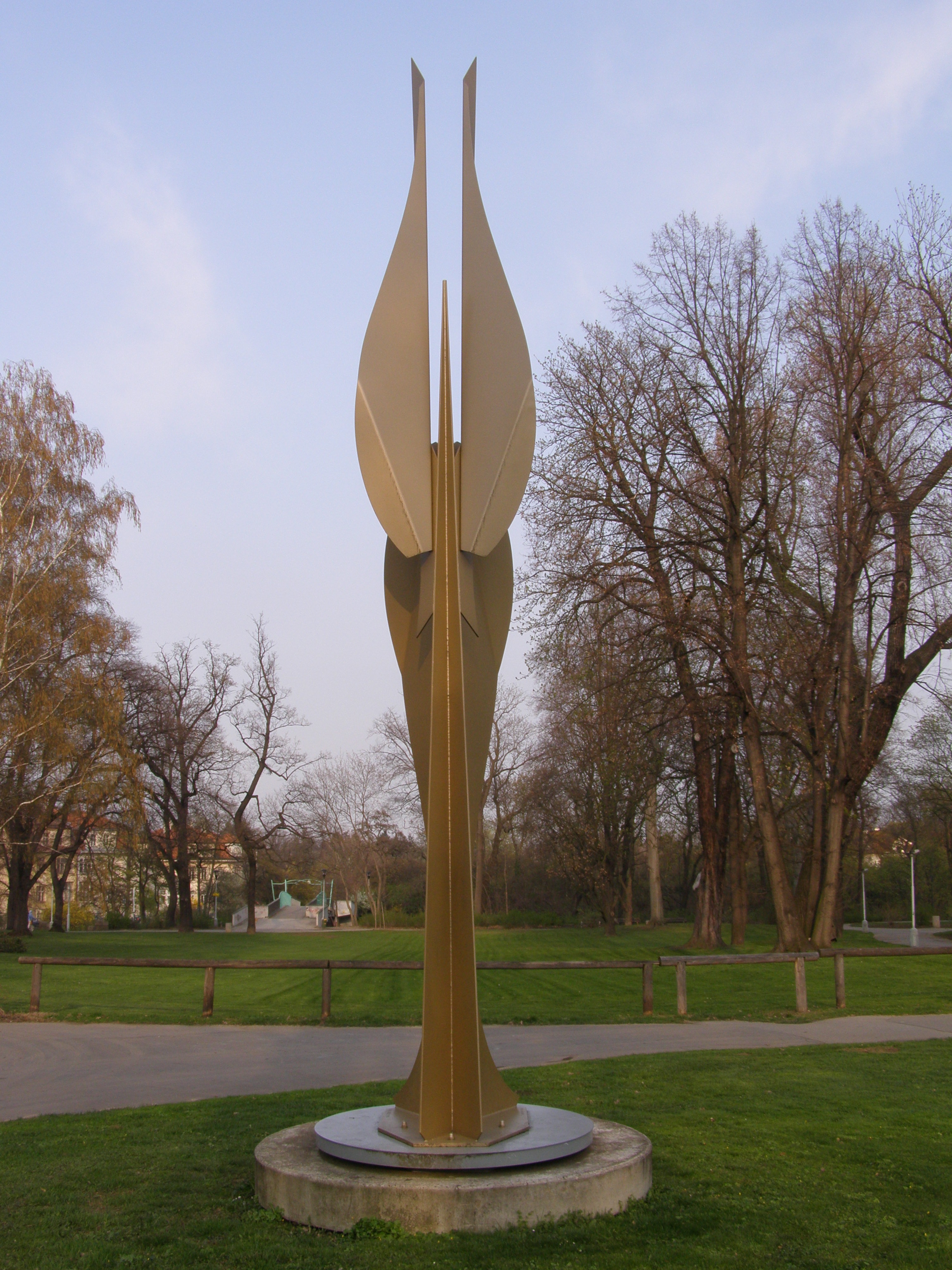 Praha, Hradčany, Chotkovy sady, pomník NIKE 89, Věnováno Čechům, kteří se zasloužili o znovuzrození demokracie ve své vlasti